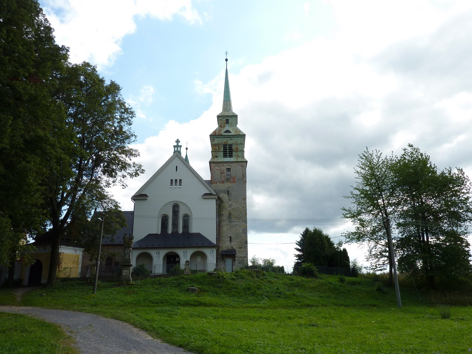 Sklené - kostel sv. Petra a Pavla